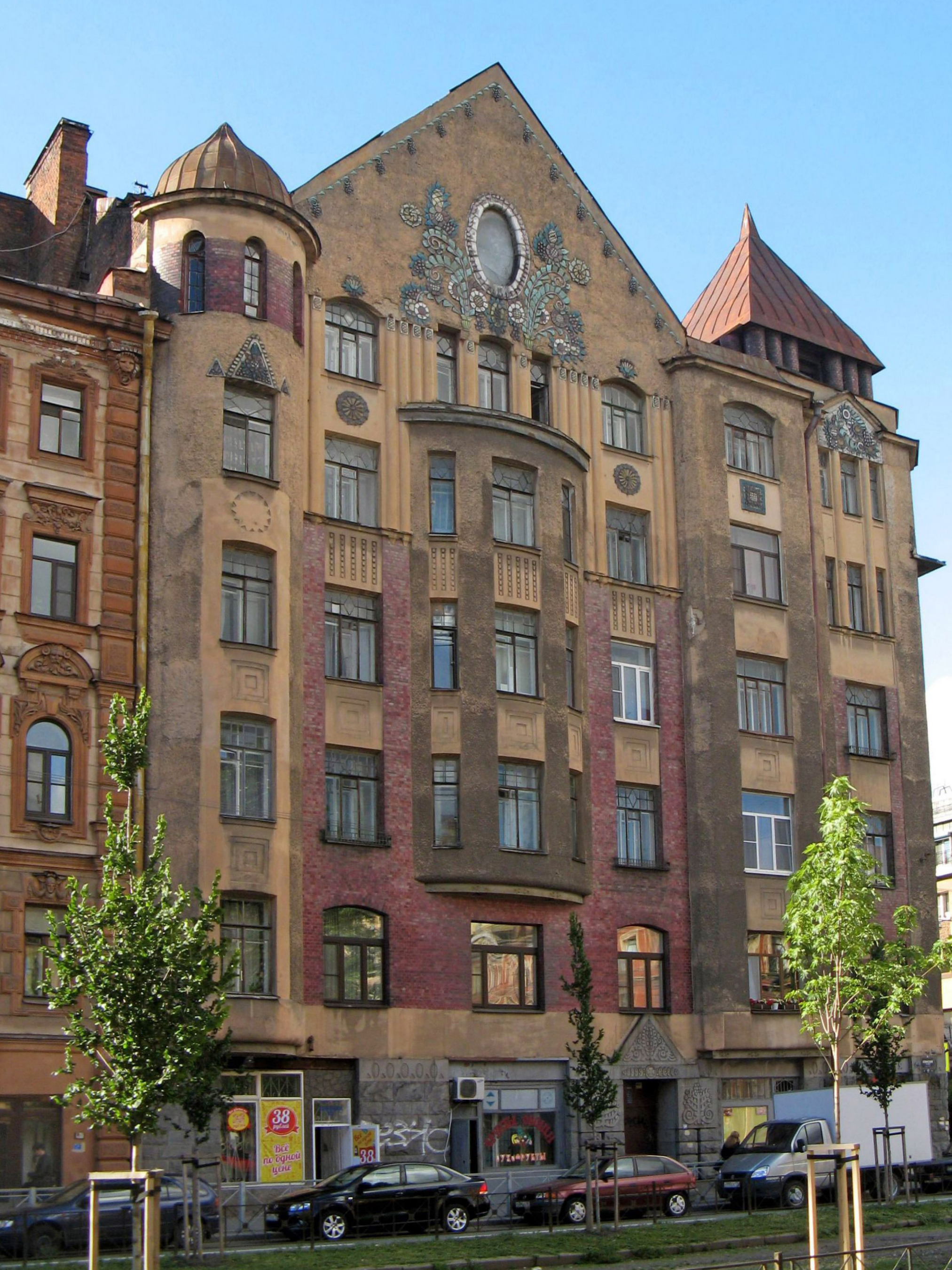 Доходный дом Захаровых: Серпуховская улица, 19, Клинский проспект, 17, Адмиралтейский район, Санкт-Петербург